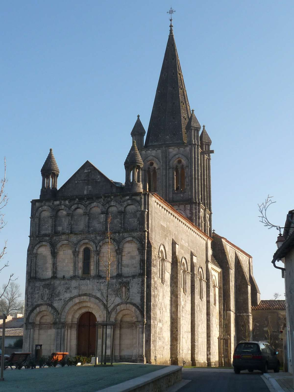 église de Gensac-la-Pallue, Charente, France